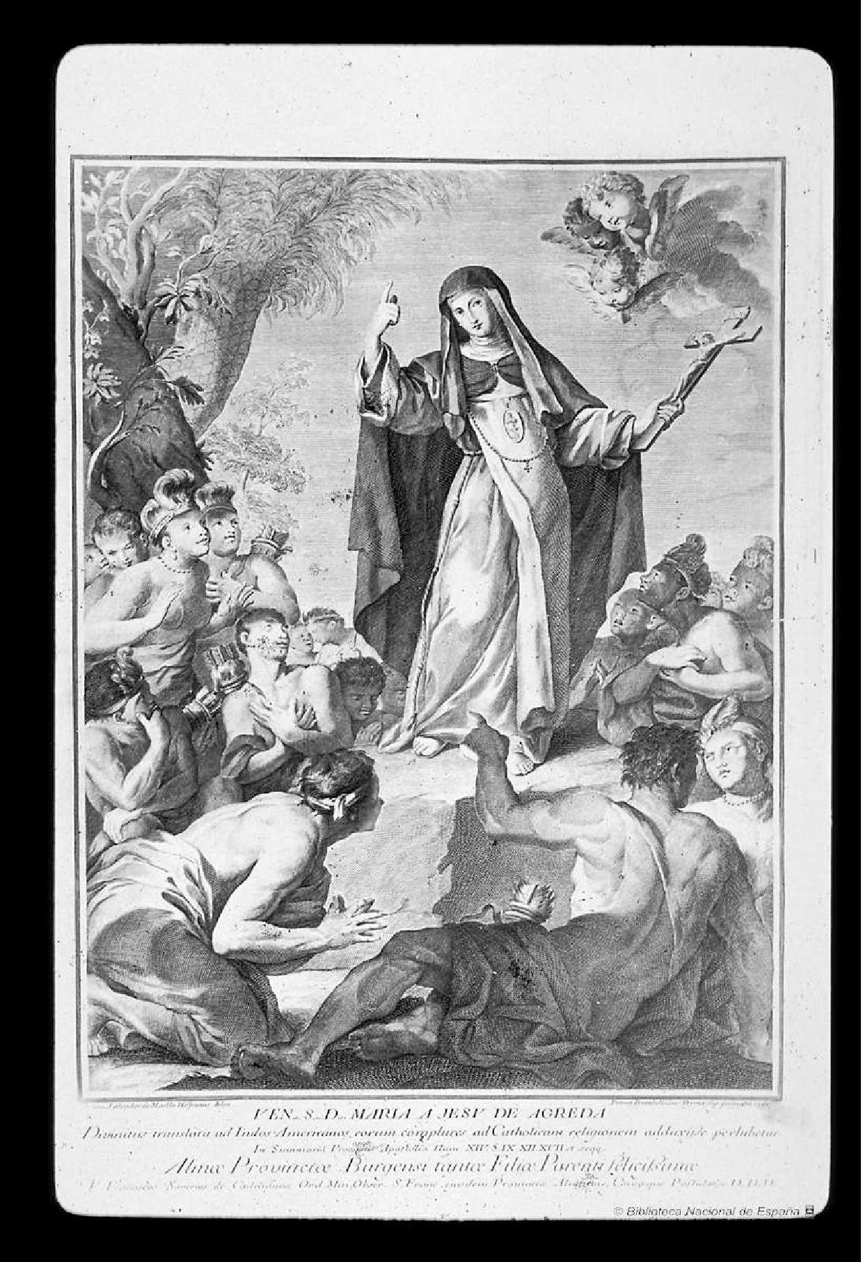 María Jesús Coronel y Arana, grabado de Pietro Leone Bombelli por dibujo de Mariano Salvador Maella. Inscripción: "Ven. S. D. Maria a Jesu de Agreda. Divinitus translata ad Indos Americanos, eorum complures ad Catholicam religionem adduxisse perhibetur In Summario Processus Apostolici. num. XIV. IX, XIII -XVII et seqq. Almae Provinciae Burgensi tantae Filiae Parenti felicissimae. F. Xaverius de Cadiñanos Ord. Min. Obser. S. Franc. ejusdem Provinciae Alumnus Causaeque Postulator. D. D. D". Biblioteca Nacional de España.